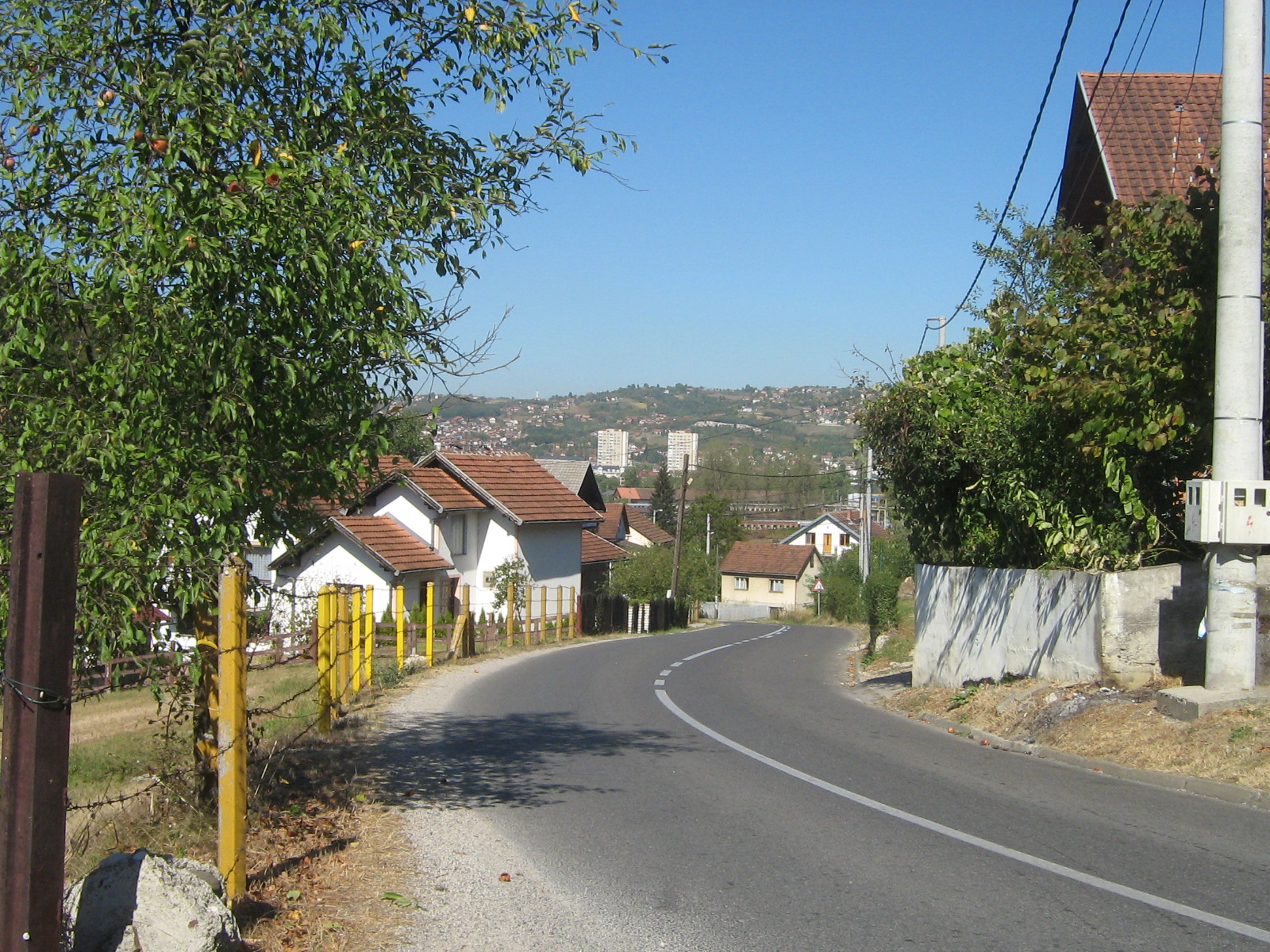 Липац, поглед према Добоју. Нешковић Дејан.